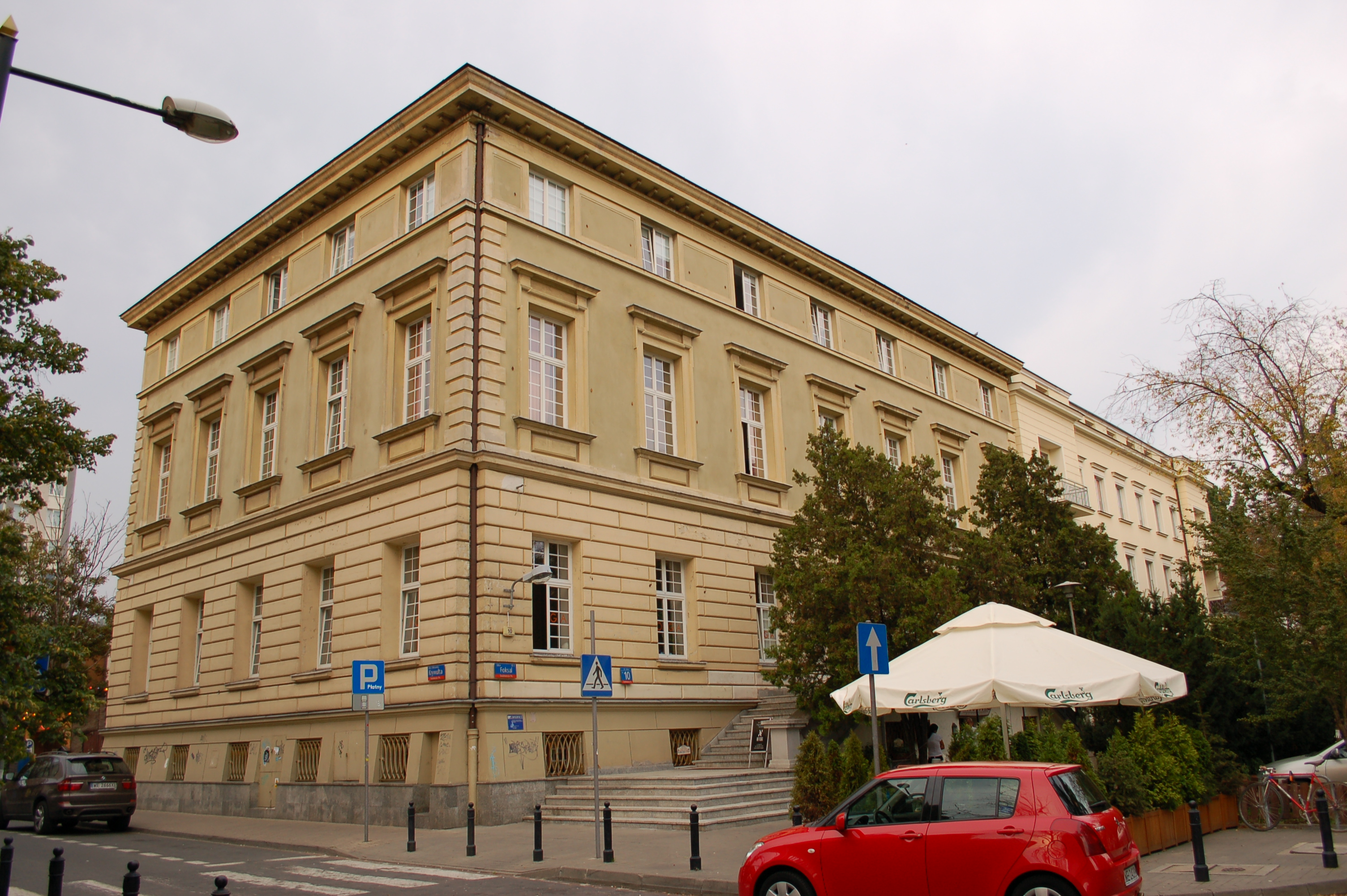 Warschau Foksal